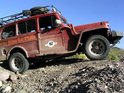 Estanciera Argentina, marca IKA Industrias Kaiser Argentina, modelo 1960, 4x4, modificada a fin de mejorar su rendimiento y confort, dueño Gabriel Buasso, aqui se la observa en la Cuesta de los Terneros, San Rafael, Provincia de Mendoza, República Argentina, 2007.